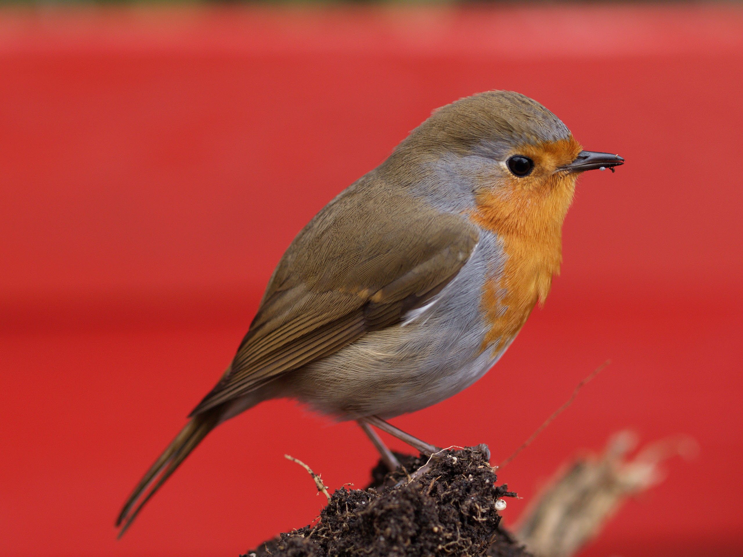 European Robin (Erithacus rubecula, cat.)